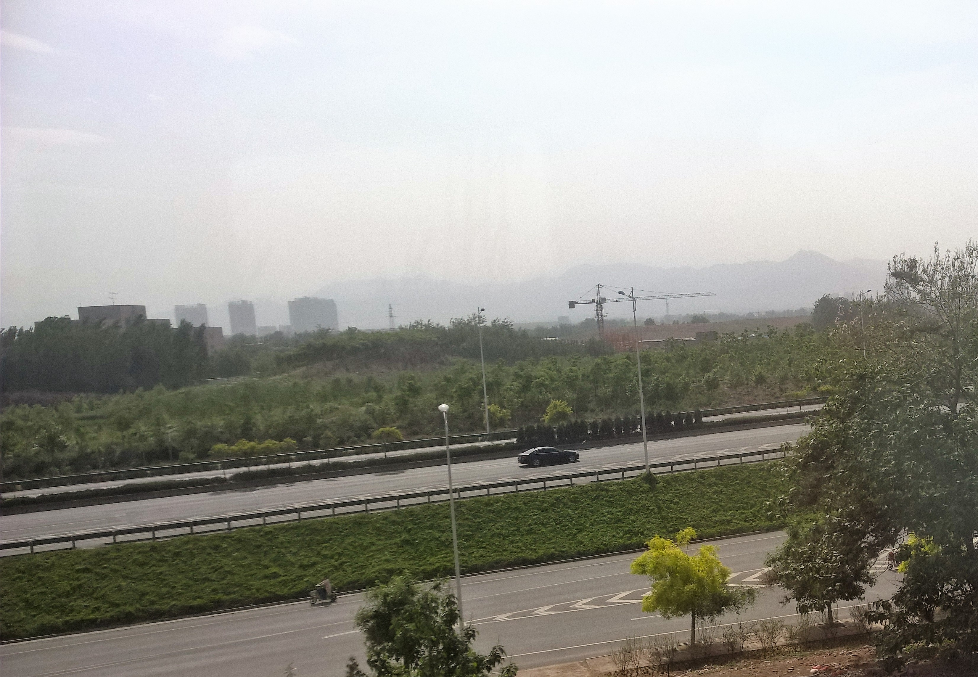 中文（中国大陆）: 石家庄西三环